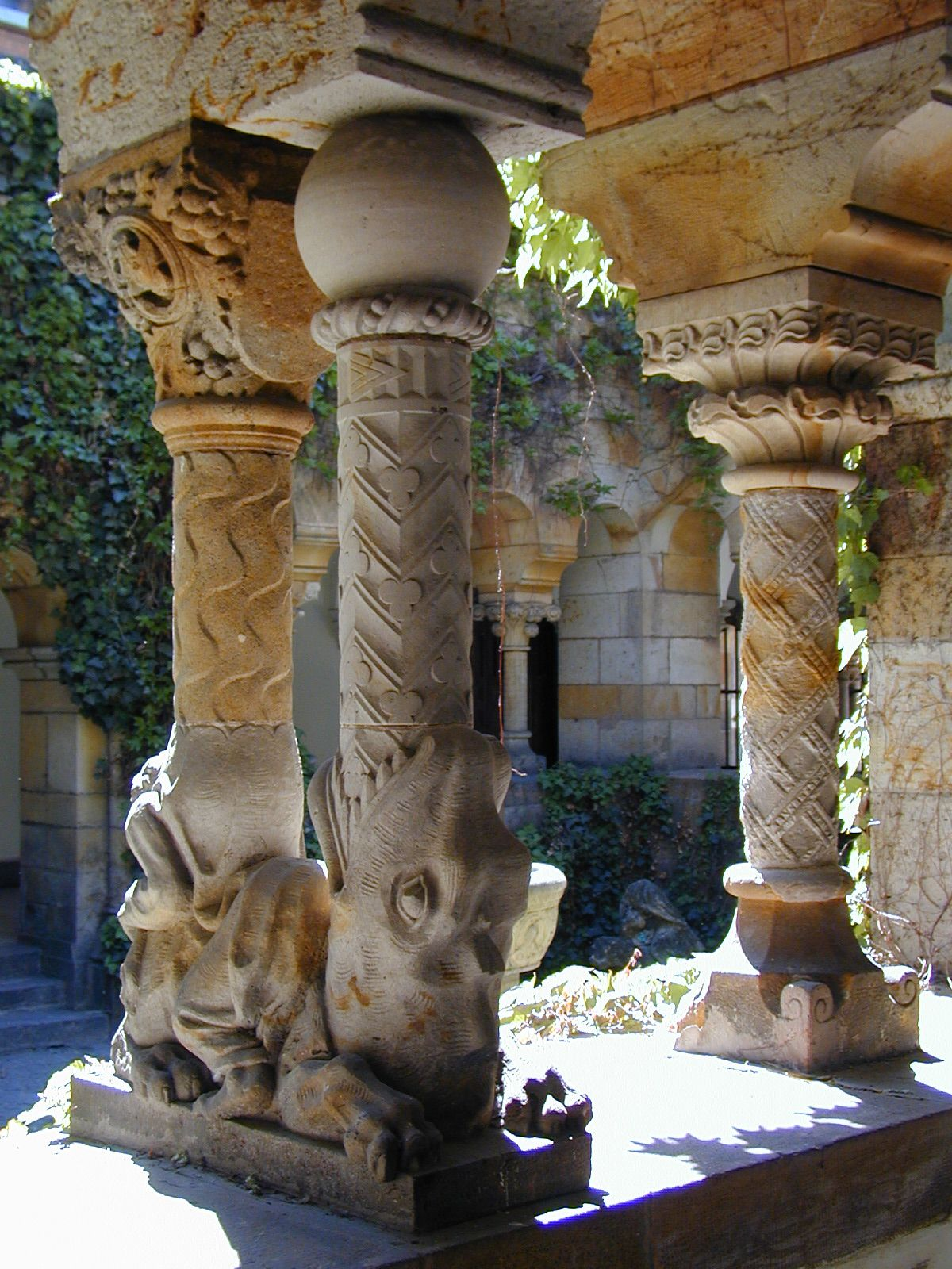 A budapesti Vajdahunyadvár román épületrészének kerengője